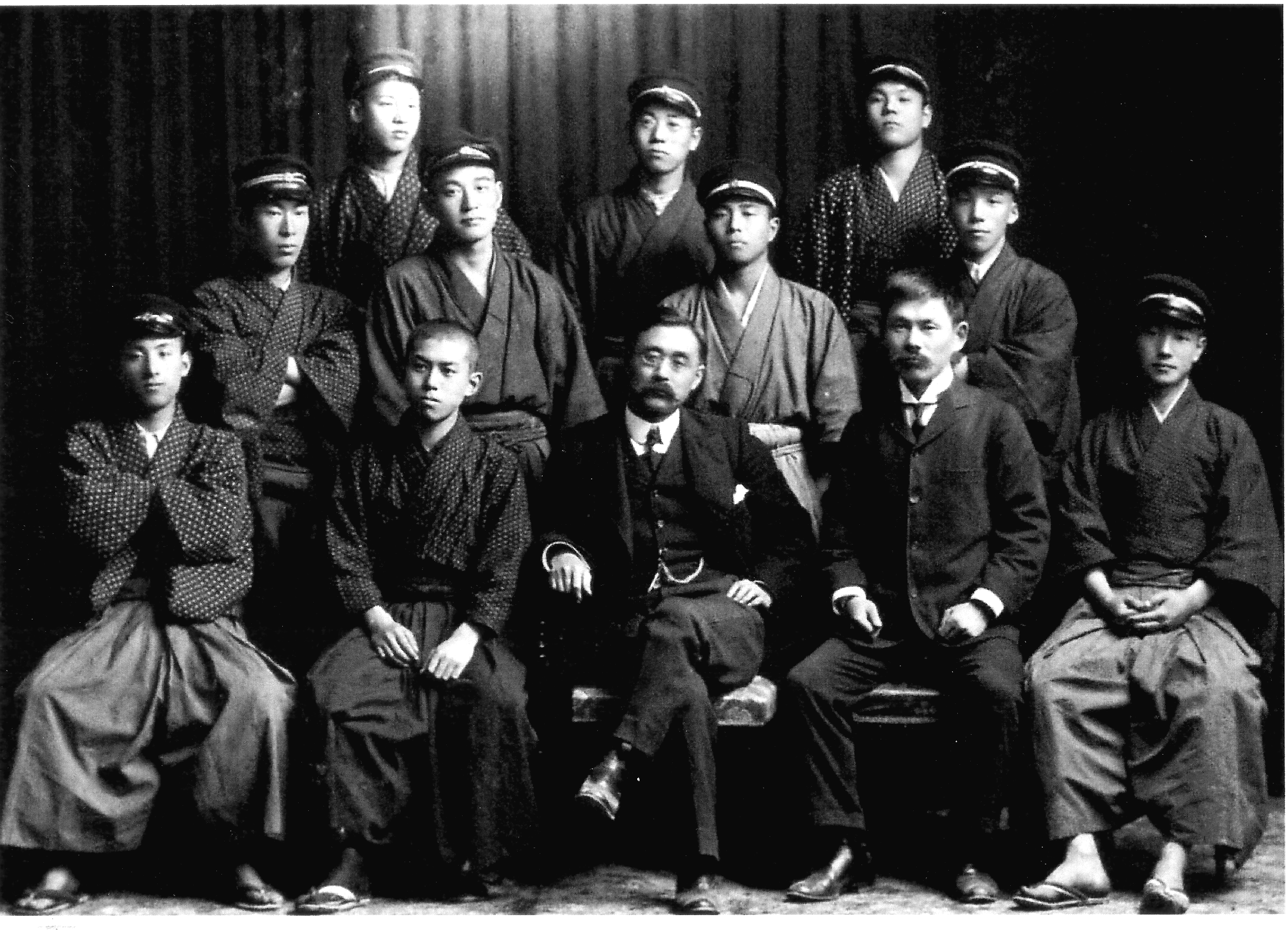 第一高等学校文芸部新旧役員（1908年5月撮影）